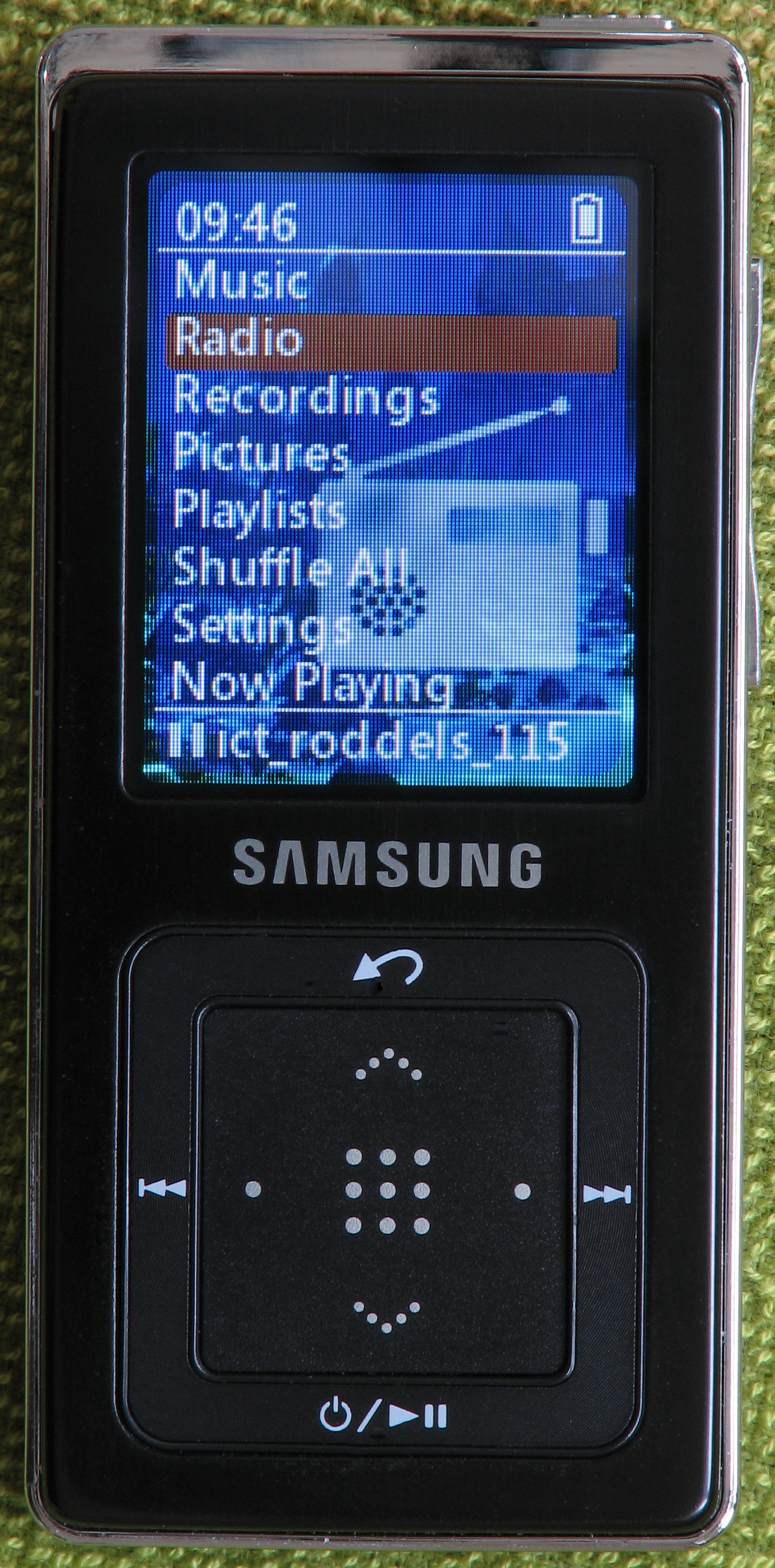 MP3 speler van Samsung (2Gb intern flash geheugen)